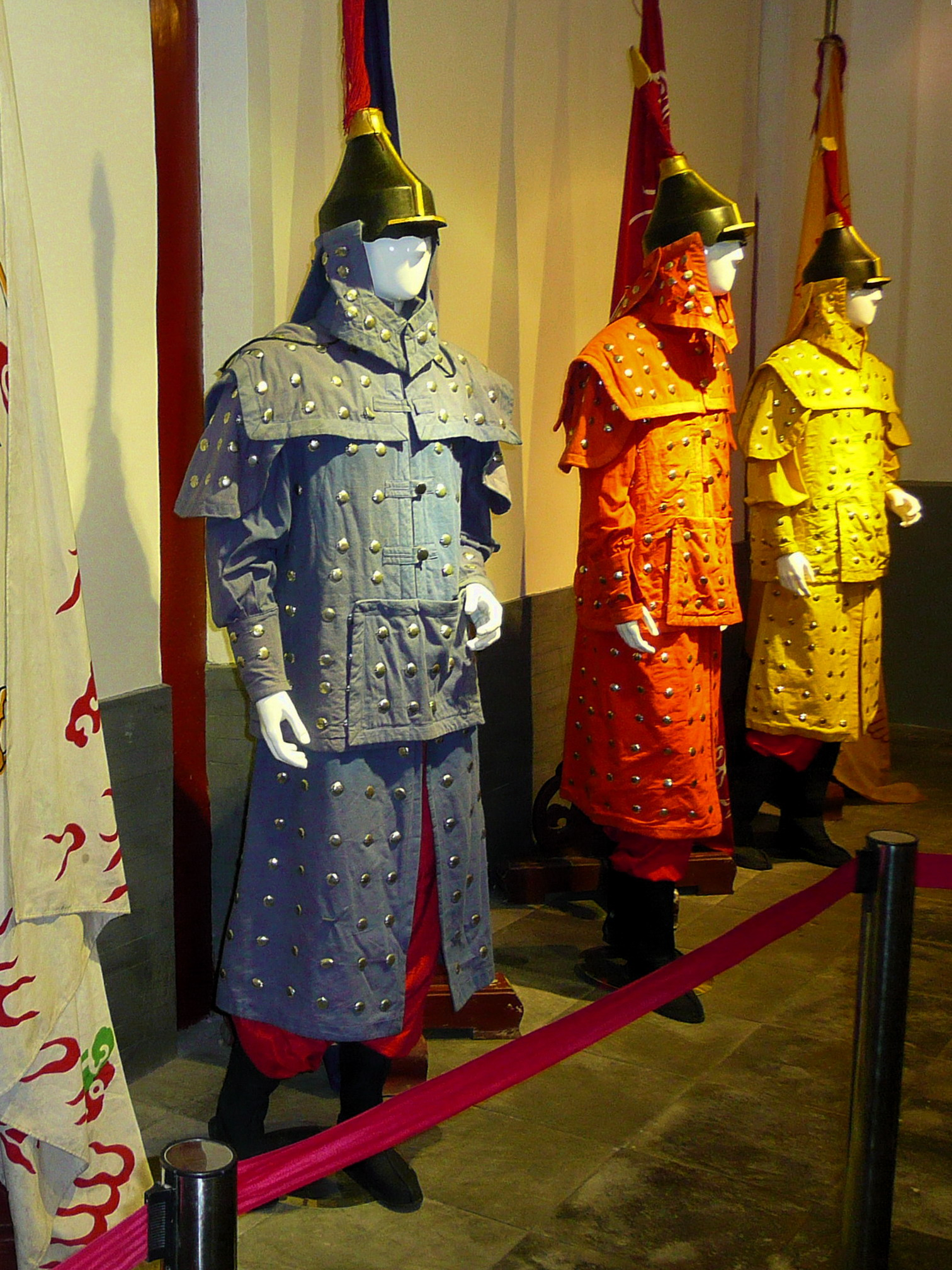 瀋陽故宮 Shenyang Imperial Palace